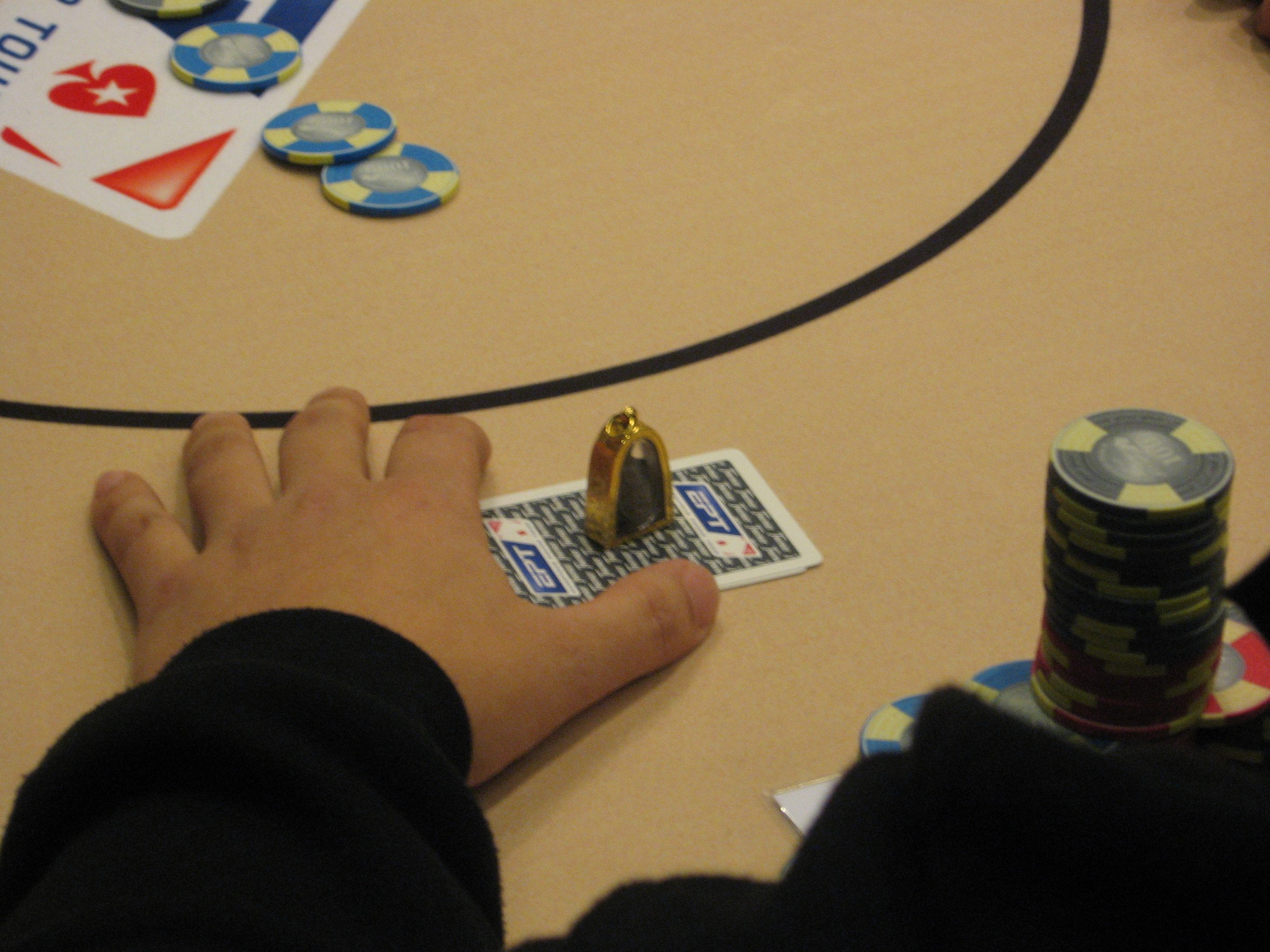 Ein Card Guard bei der European Poker Tour